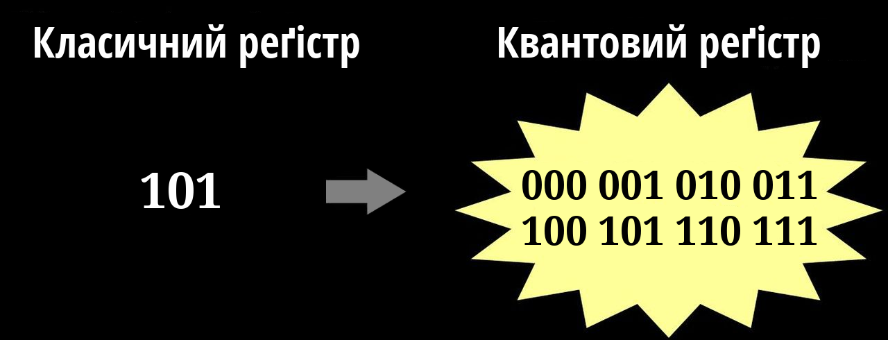 Переробка та переклад українською зображення